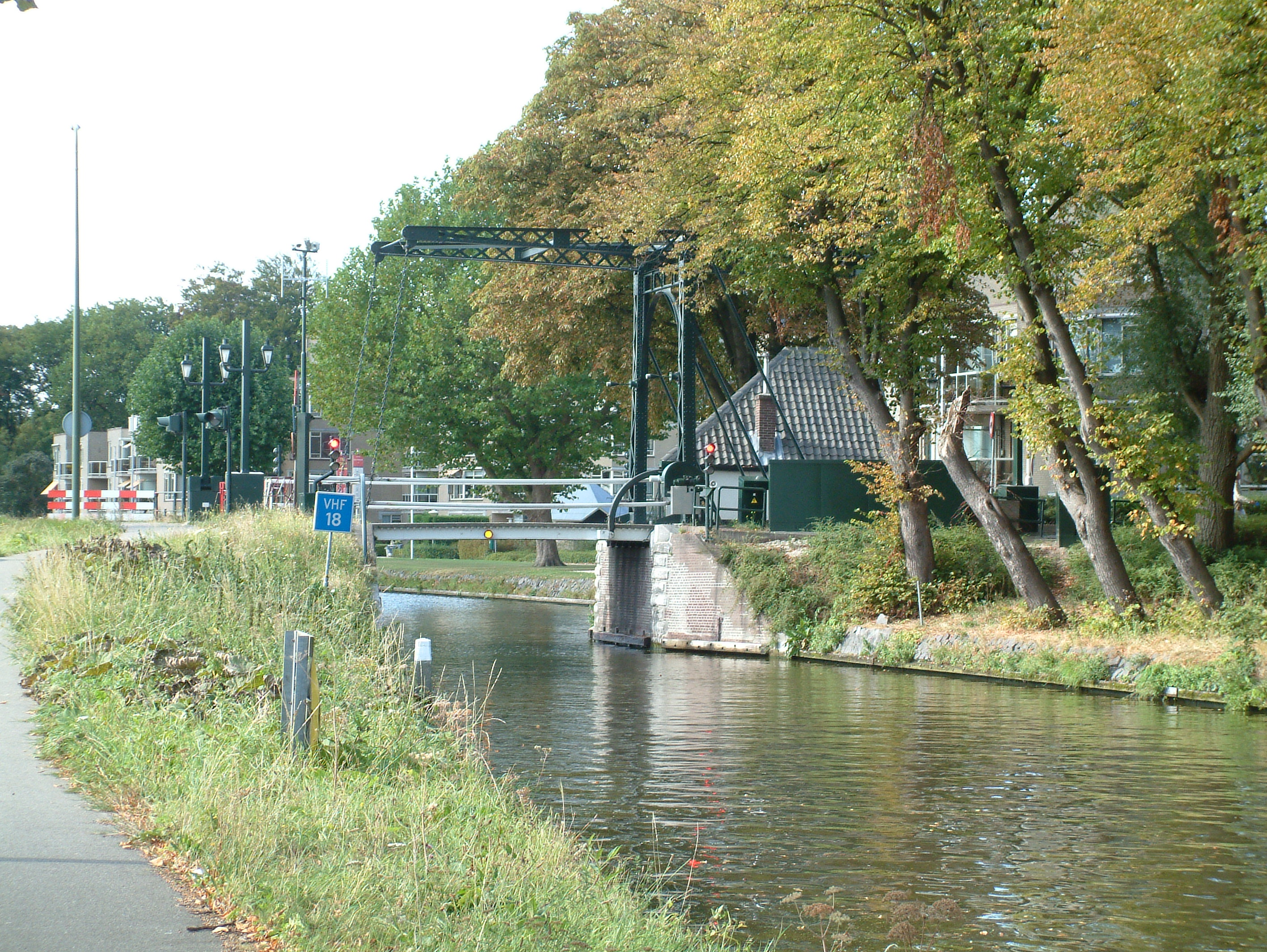 Brug in Leidschendam